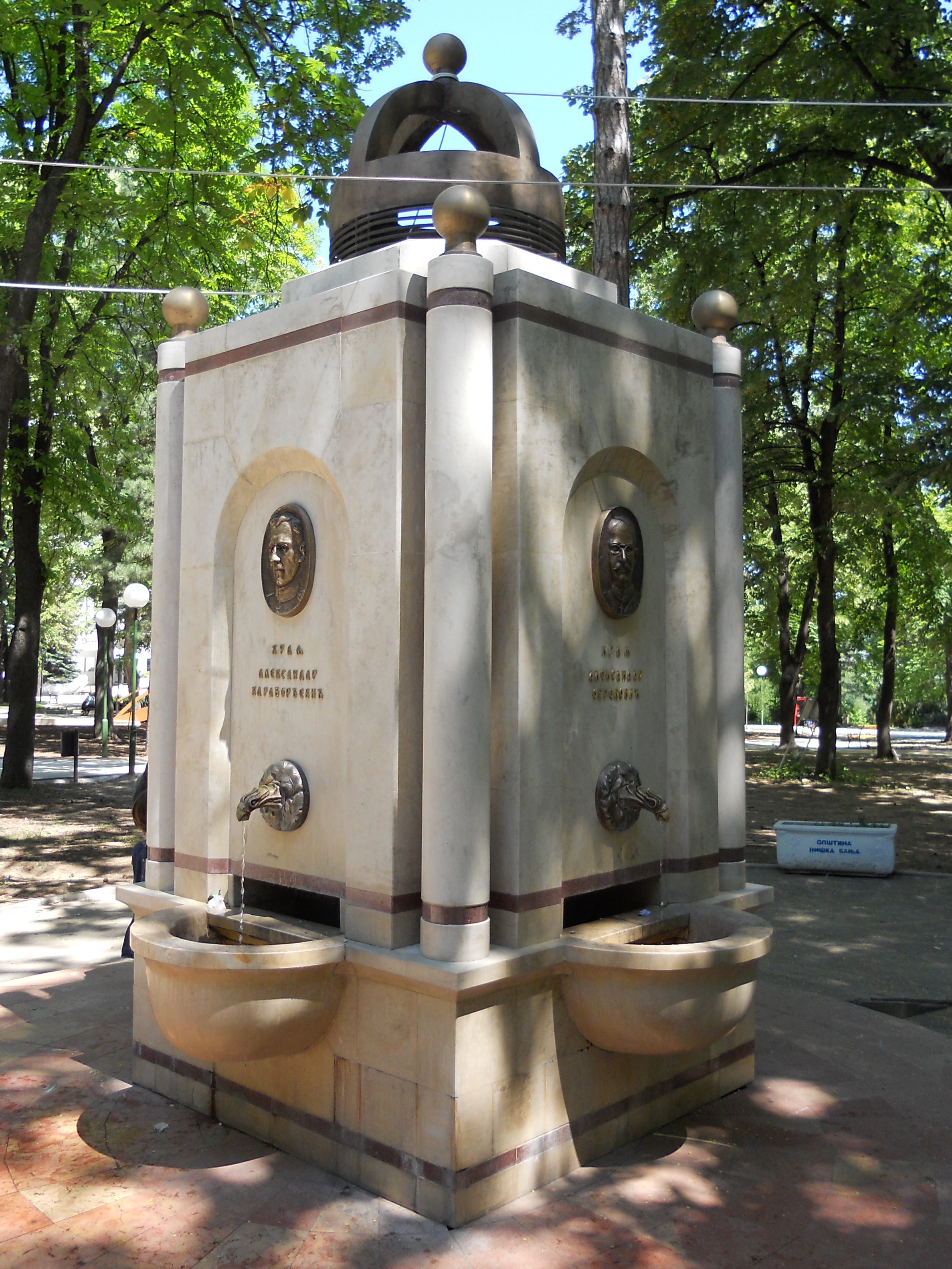 Česma „Tri kralja“ (Aleksandra Karađorđevića, Aleksandra Obrenovića i Milana Obrenovića) u centralnom parku u Niškoj Banji. Autor: dr Milorad Dimić, Niš, Srbija, 17. jun 2012.